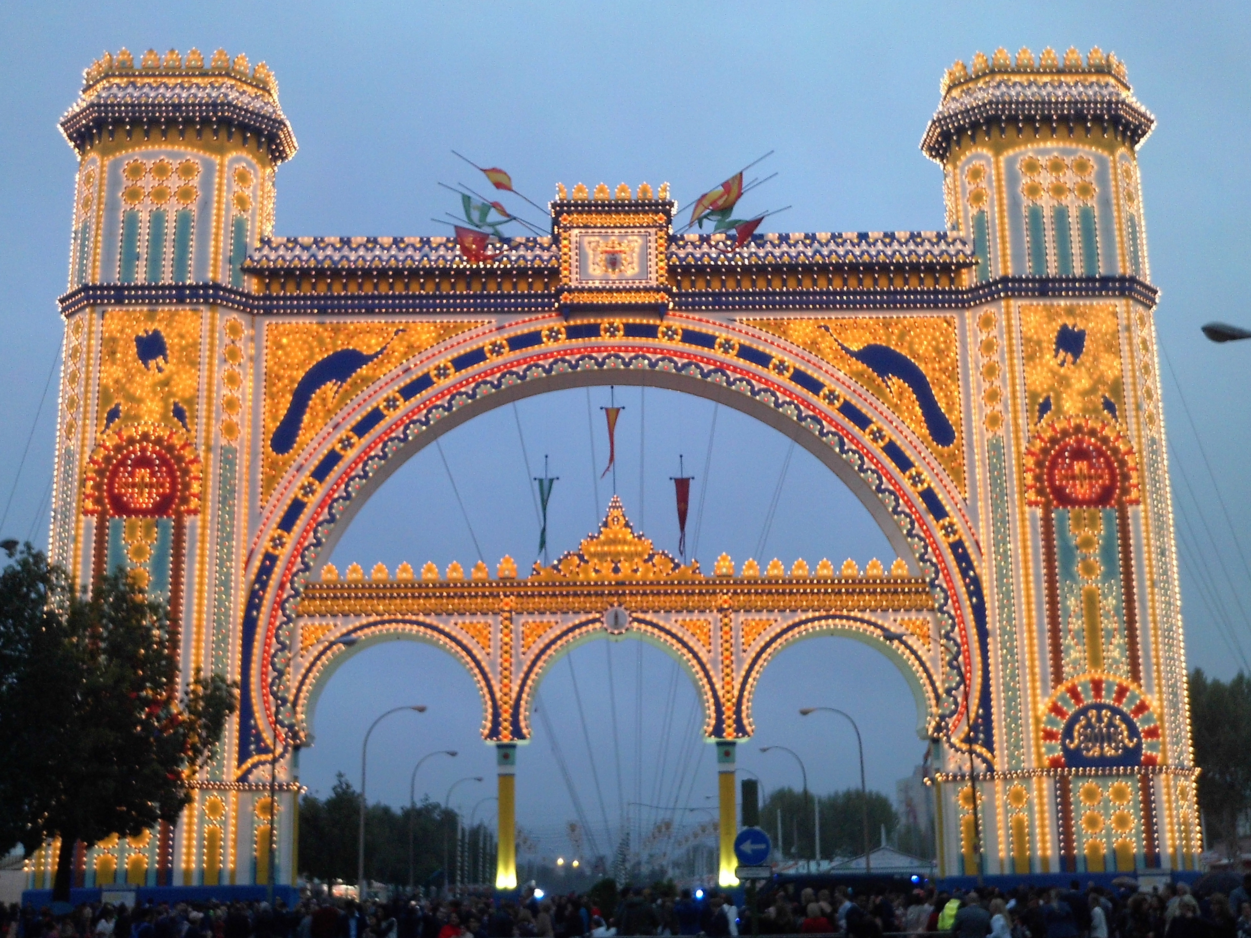 Feria de Abril. Sevilla, Andalucía, España.